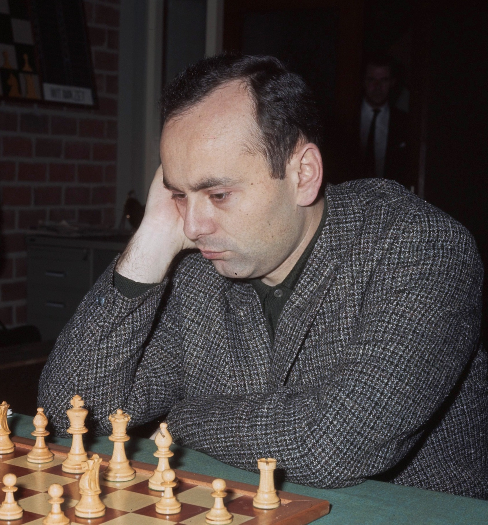 Hoogovenschaaktoernooi te Beverwijk; Portisch, Hongarije